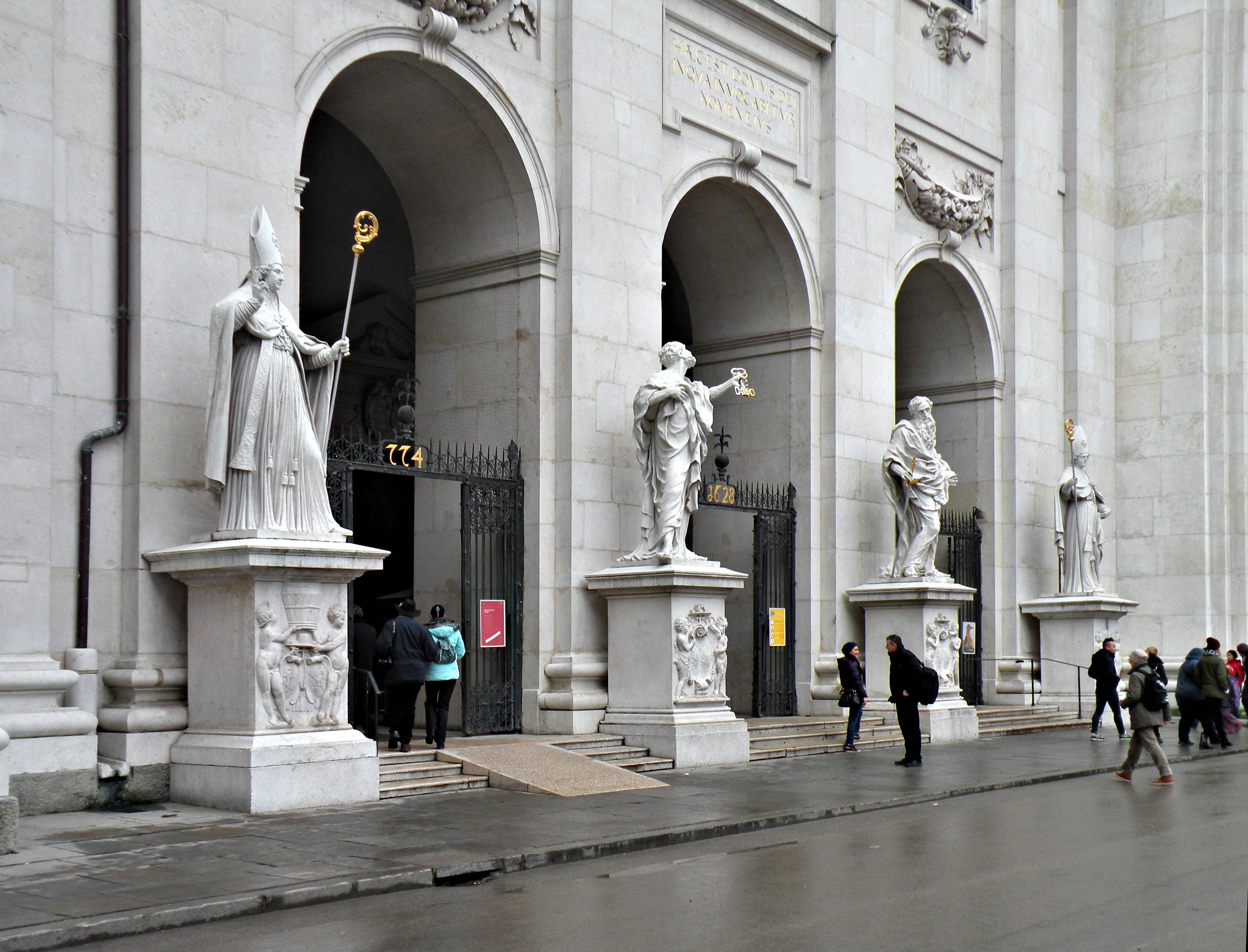 Портал Кафедрального собора